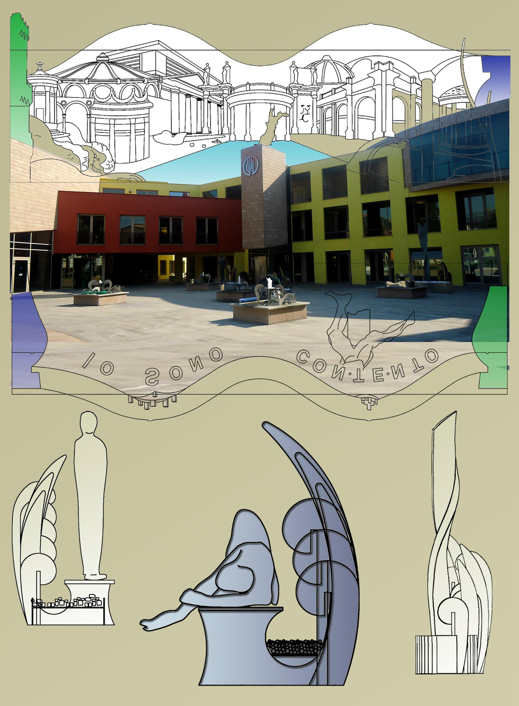 Piazza e foyer della sala congressi (Valdinievole)